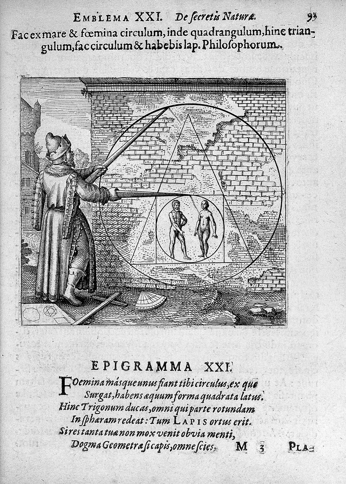 Epigramma XXI Rare Books